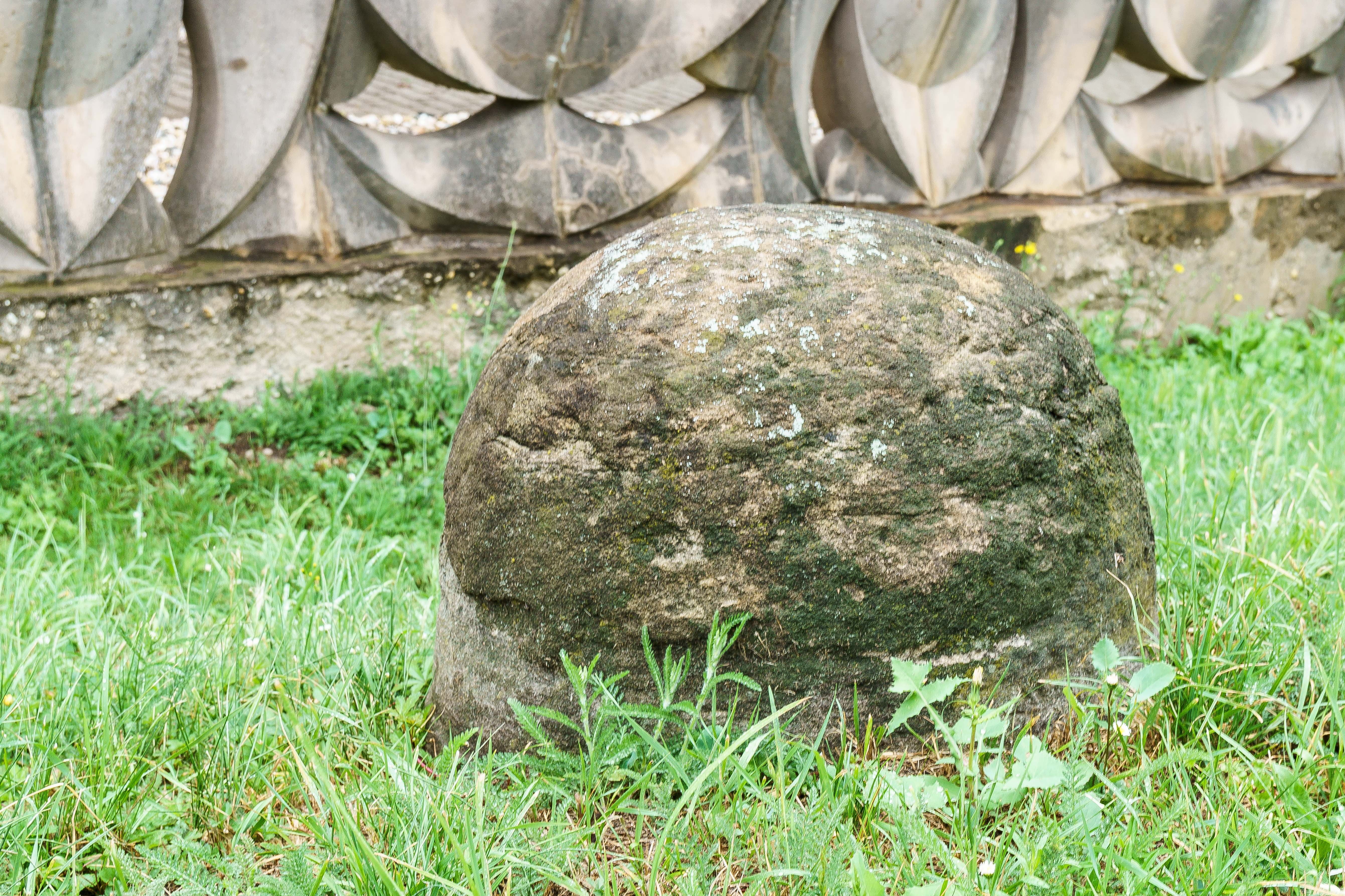 Preußischer Viertelmeilenstein an der B2 in Reuden (Elsteraue)